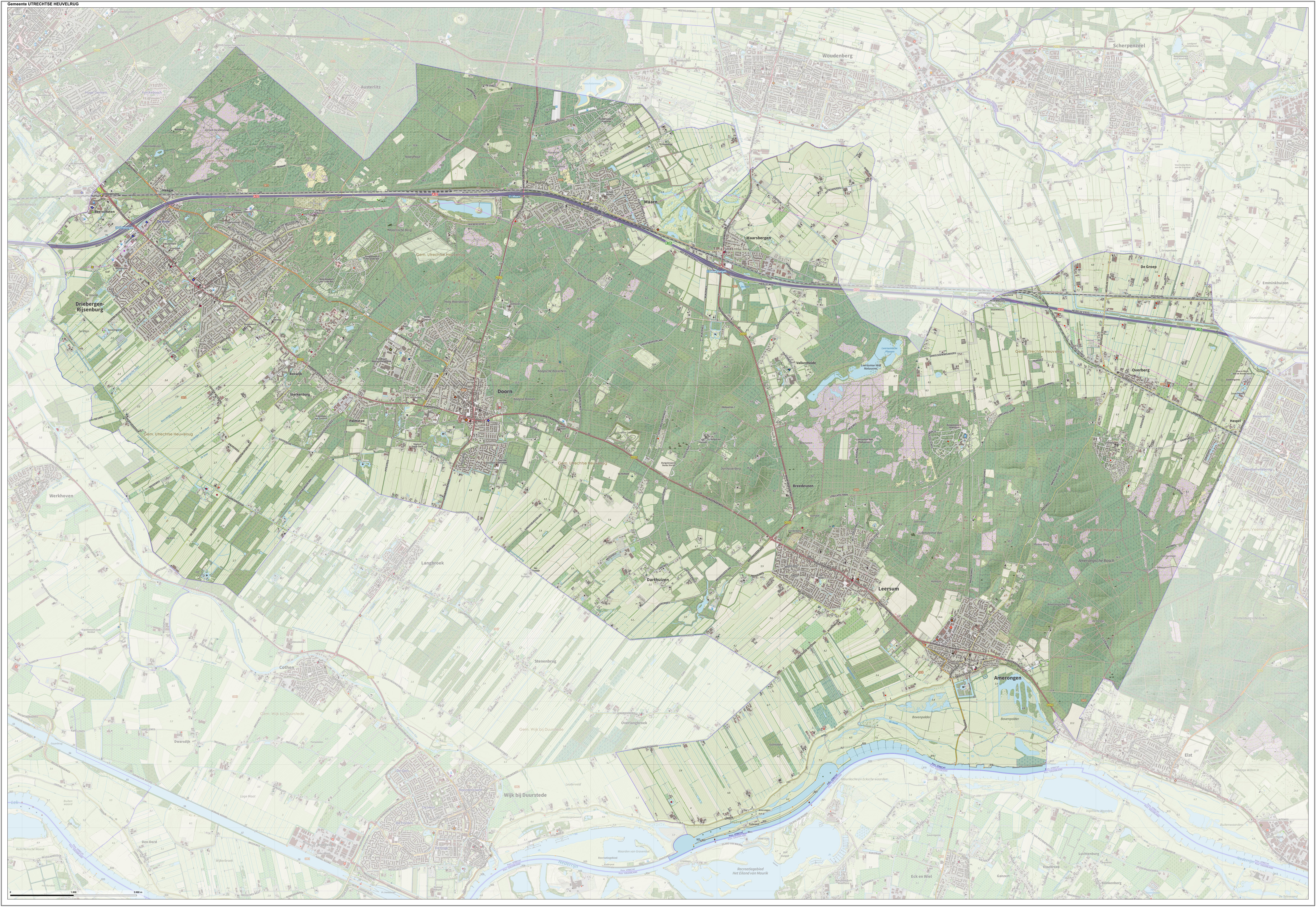 Topografische gemeentekaart. Resolutie: 400 pixels/km. Kaartbeeld samengesteld uit de open geodata van de Top10NL en Top25namen (Kadaster), Creative Commons-BY licentie. Gebouwvlakken uit open geodata BAG extract. Wegen uit de OpenStreetMap, OpenStreetMap community. Reliëfschaduw uit de Actuele Hoogtekaart AHN2. Samenstelling en kleurenschema: Jan-Willem van Aalst, met QGIS. Zie ook de Legenda.